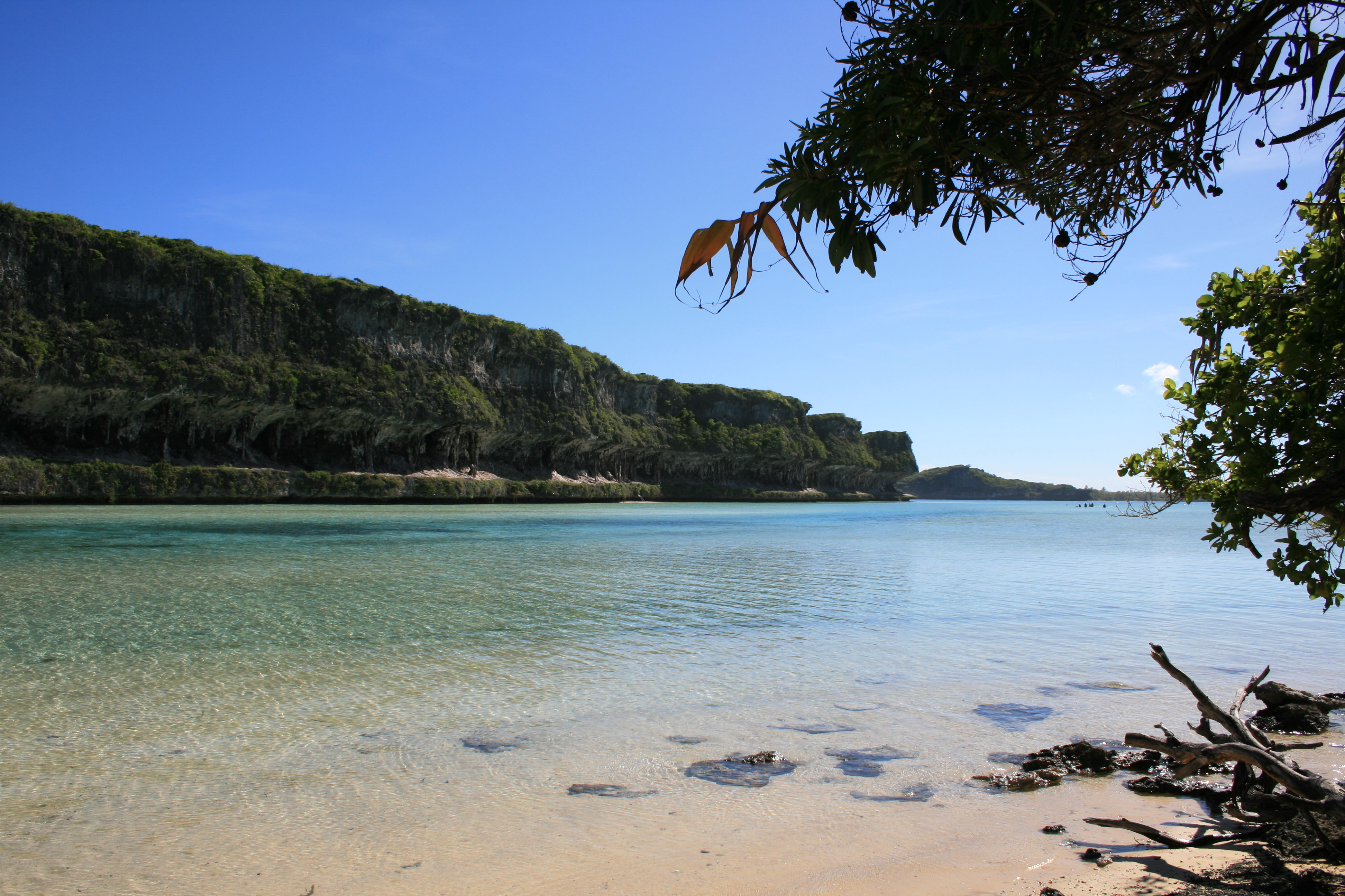 Falaises de Lekini